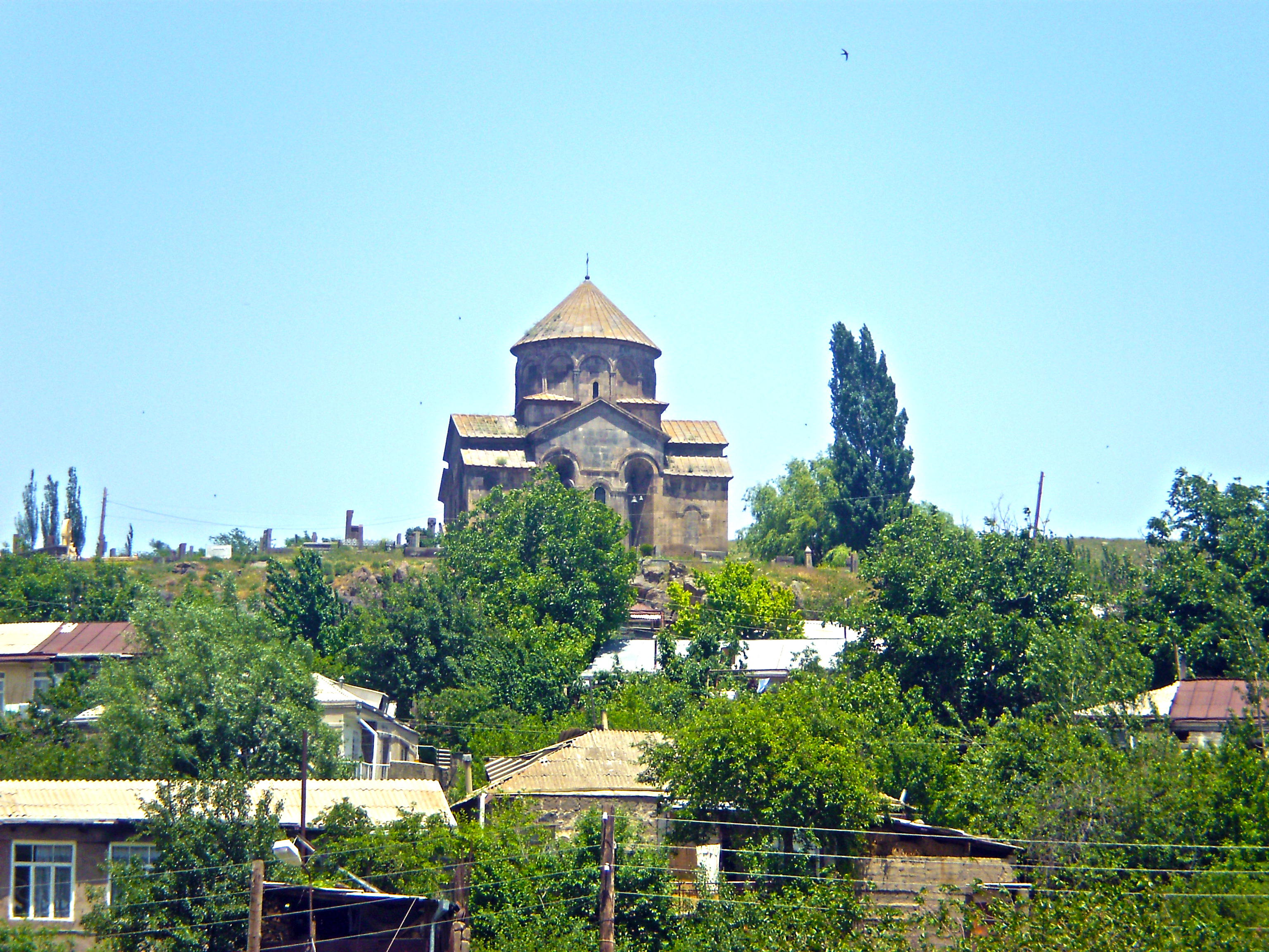 ԵԿԵՂԵՑԻ ՍԲ. ՀՈՎՀԱՆ­ՆԵՍ 6/14